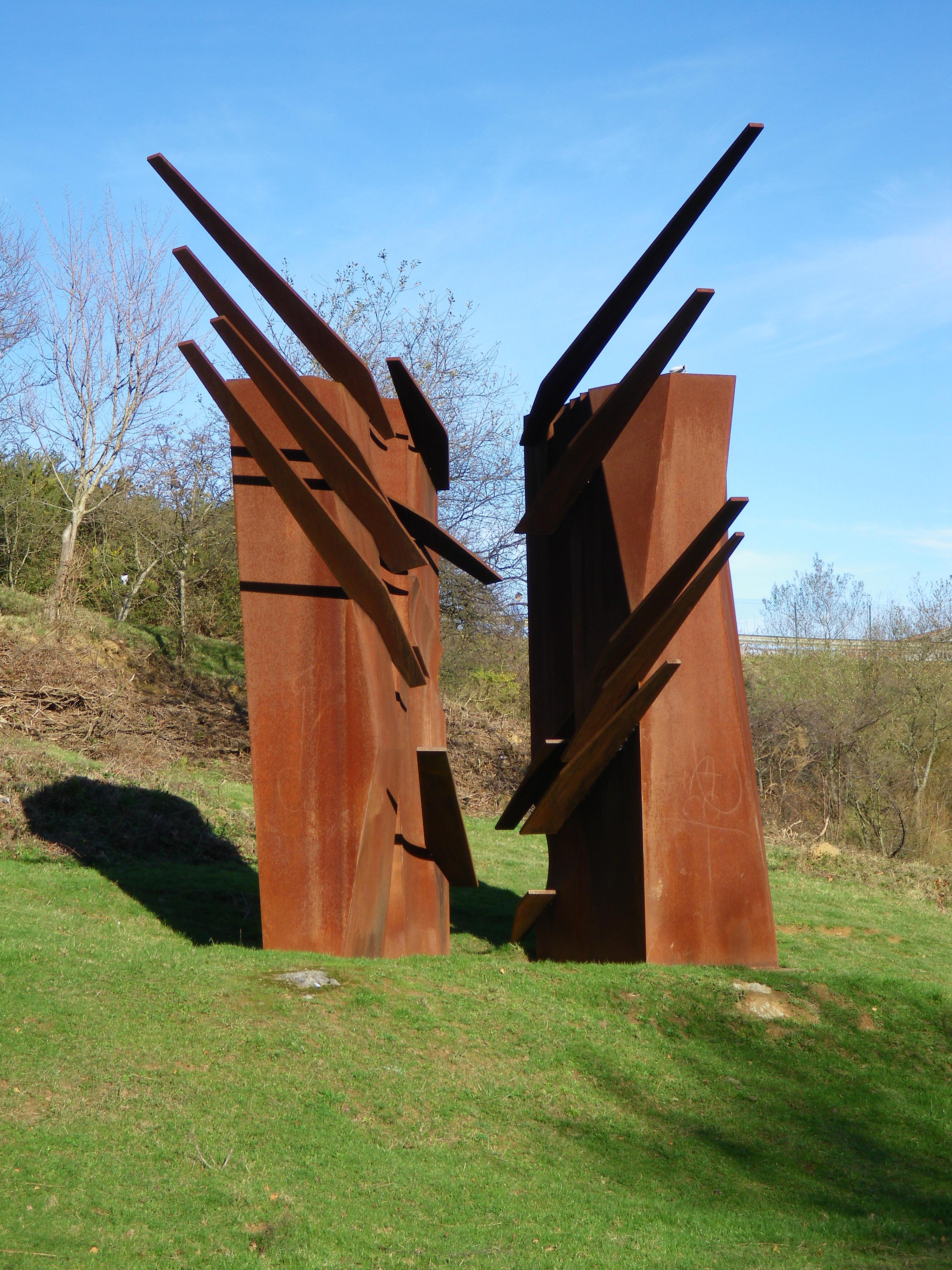 Lurraren alde, Nestor Basterretxea Artzadun eskultorearen lan bat da, "Meatzaldea Goikoa" eskultura parkean. Zugaztieta, Trapagaran, Meatzaldea, Bizkaia, Euskadi.